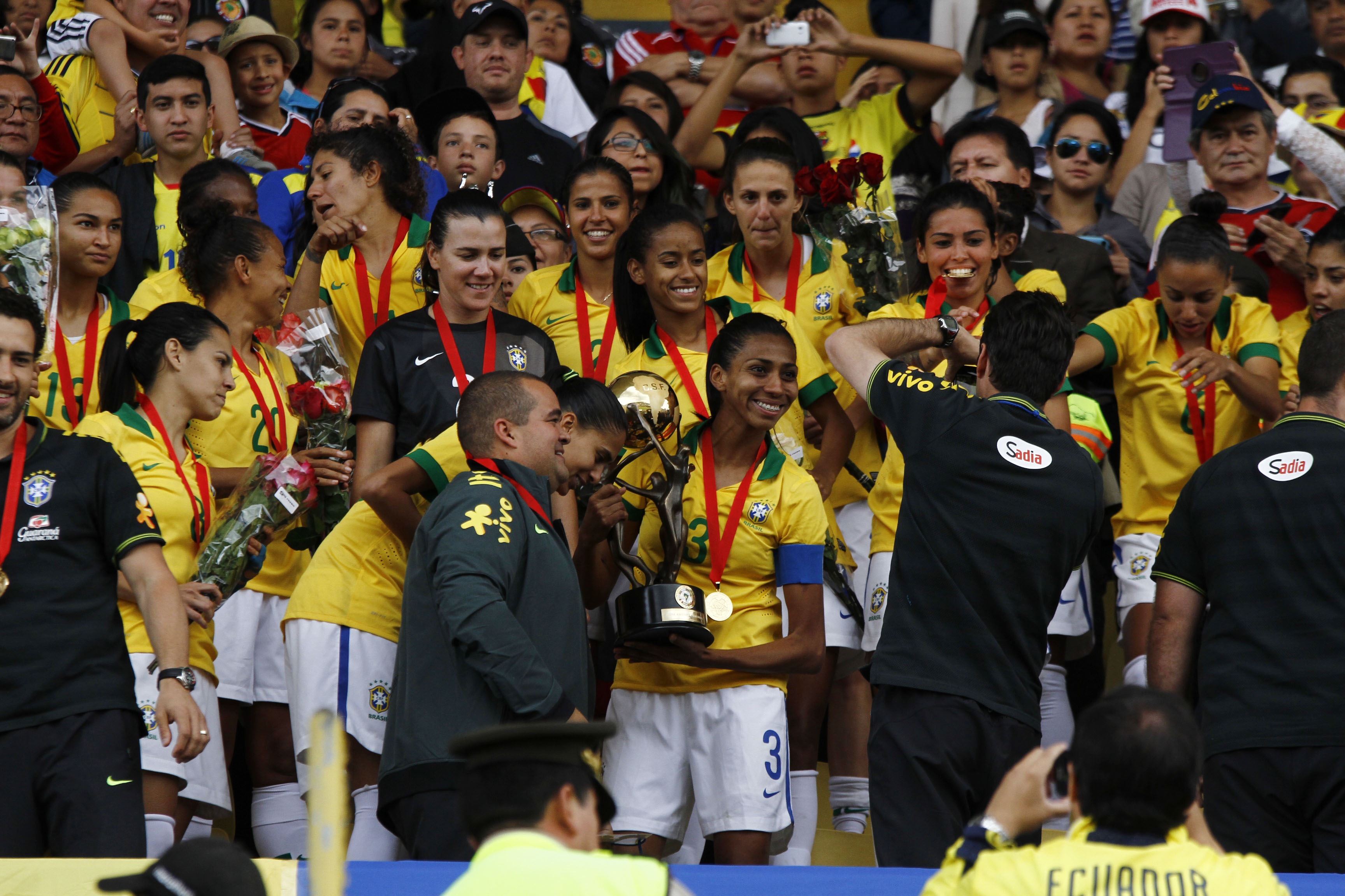 Quito, 28 sep (Andes).- La selección brasileña femenina de fútbol se proclamó Campeona de la Copa América de Fútbol Ecuador 2014. Foto: Micaela Ayala V./Andes